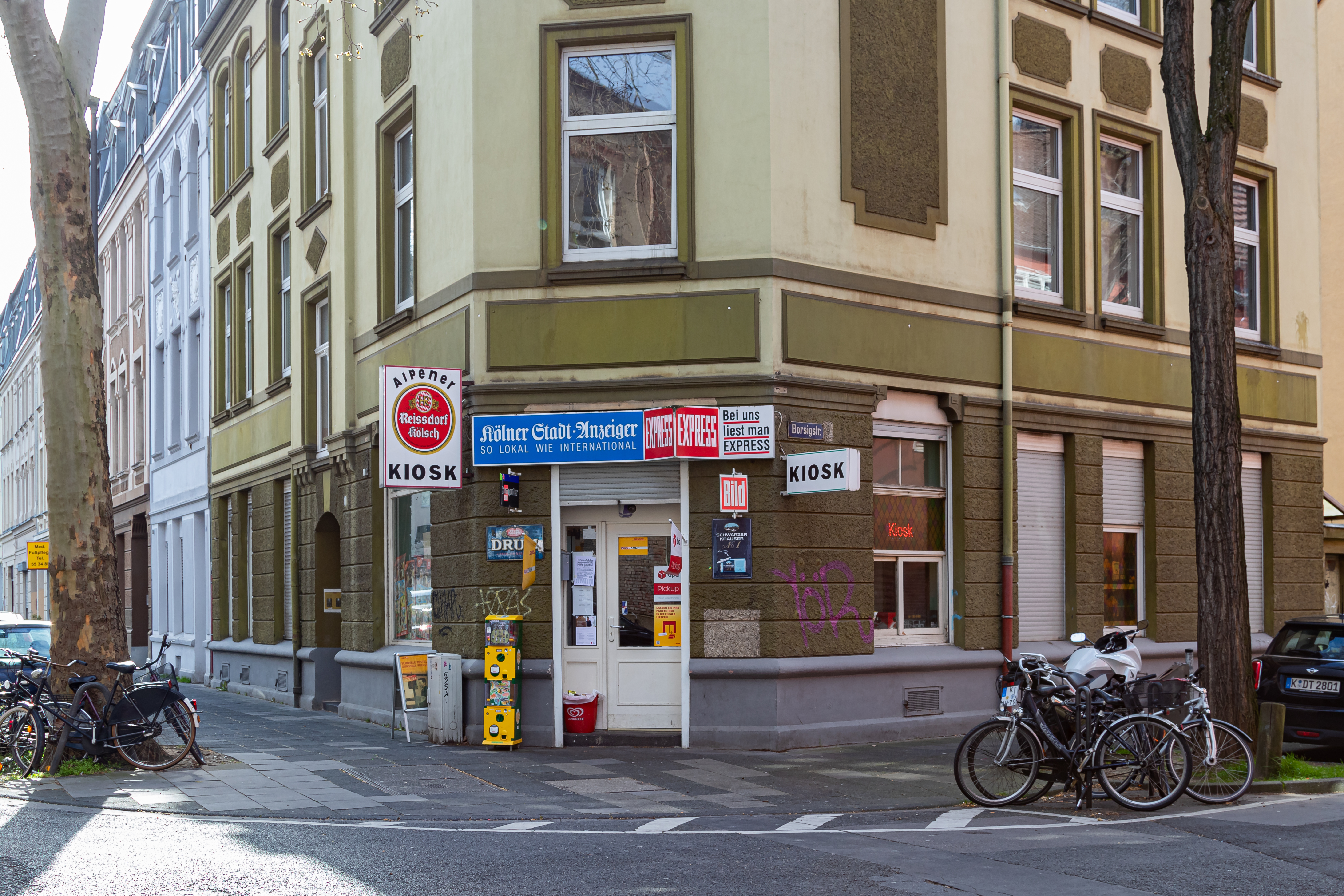 Büdchen Alpener Strasse Ecke Borsigstraße in Köln-Ehrenfeld